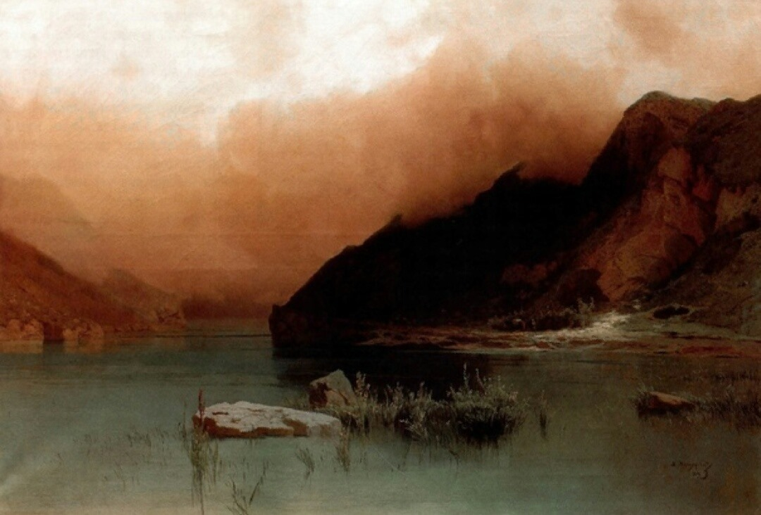 Мещерский Арсений «Озеро Эзель-Ам в Чечне» 1890 Иркутский художественный музей